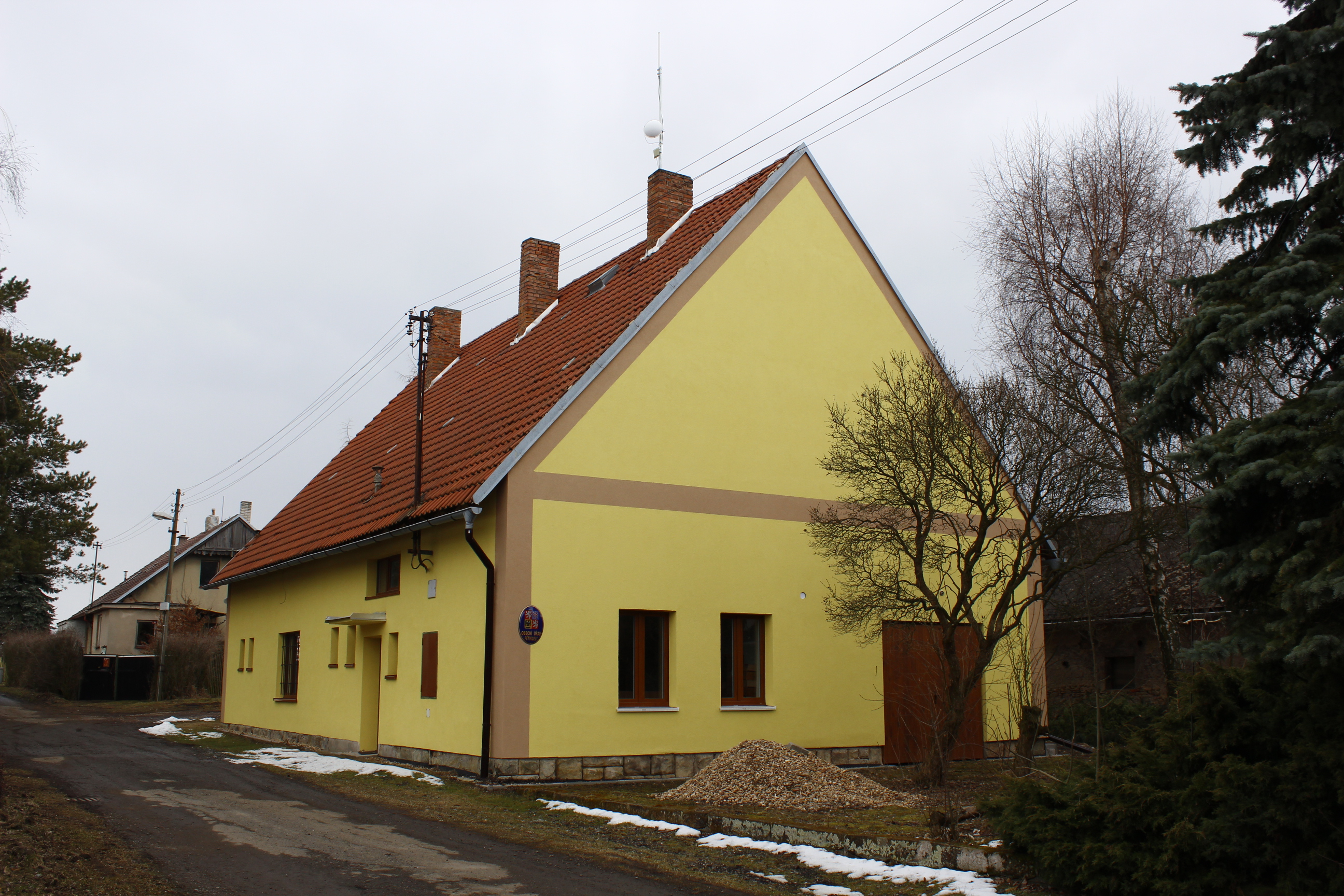 Budova obecního úřadu v Pětikozlech (dům čp. 43).